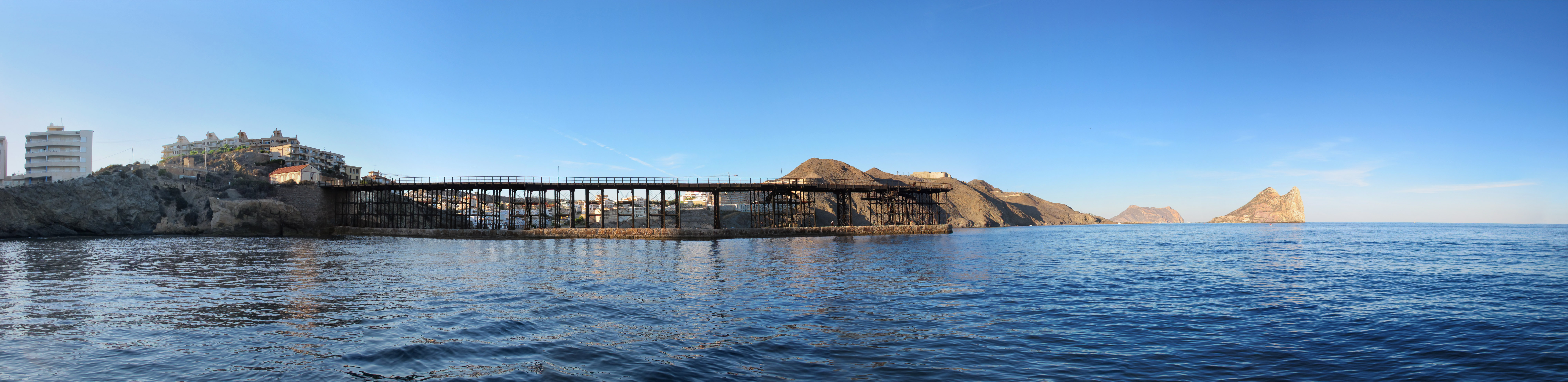 Embarcadero del Hornillo en Águilas, Murcia (España)